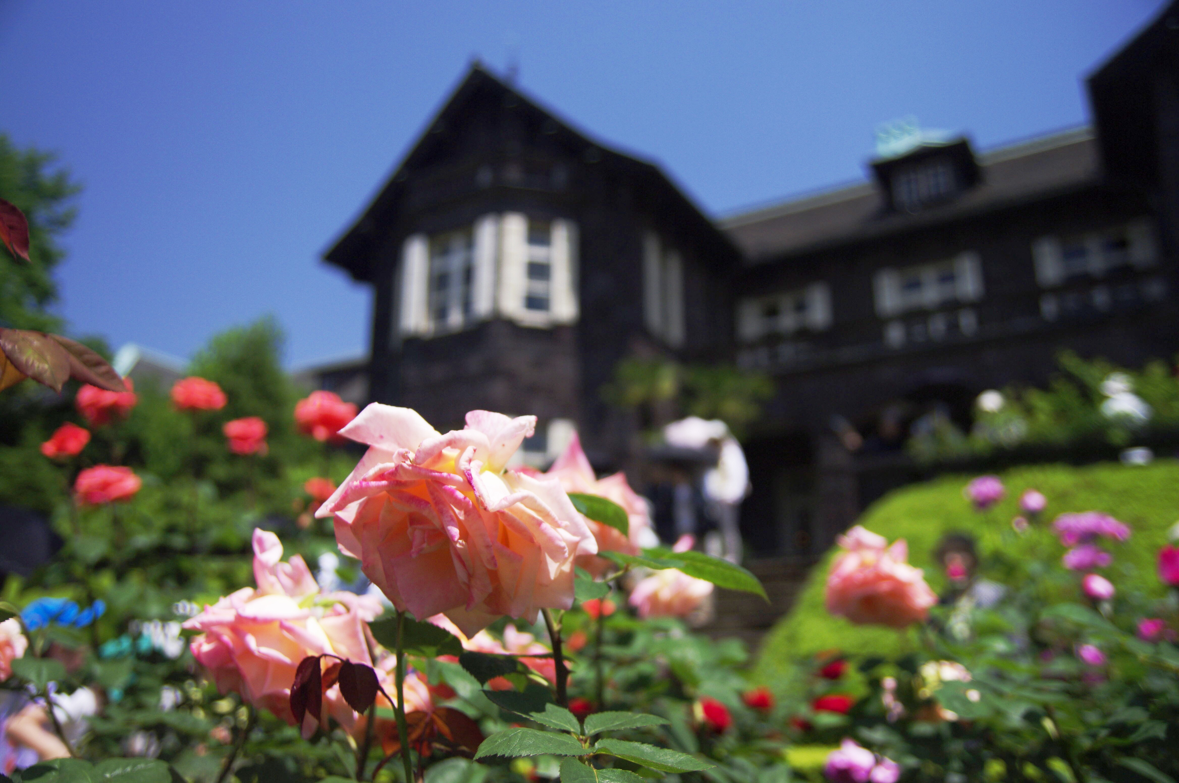 旧古河庭園のバラ。ボケ表現(写真)。